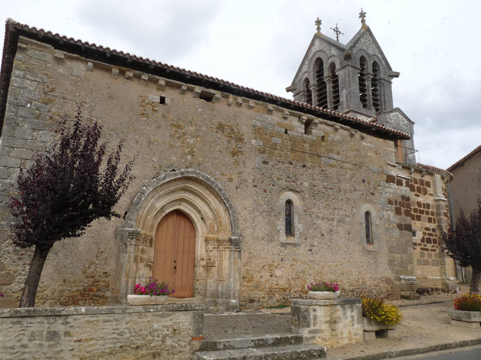 église d'Épenède, Charente, France